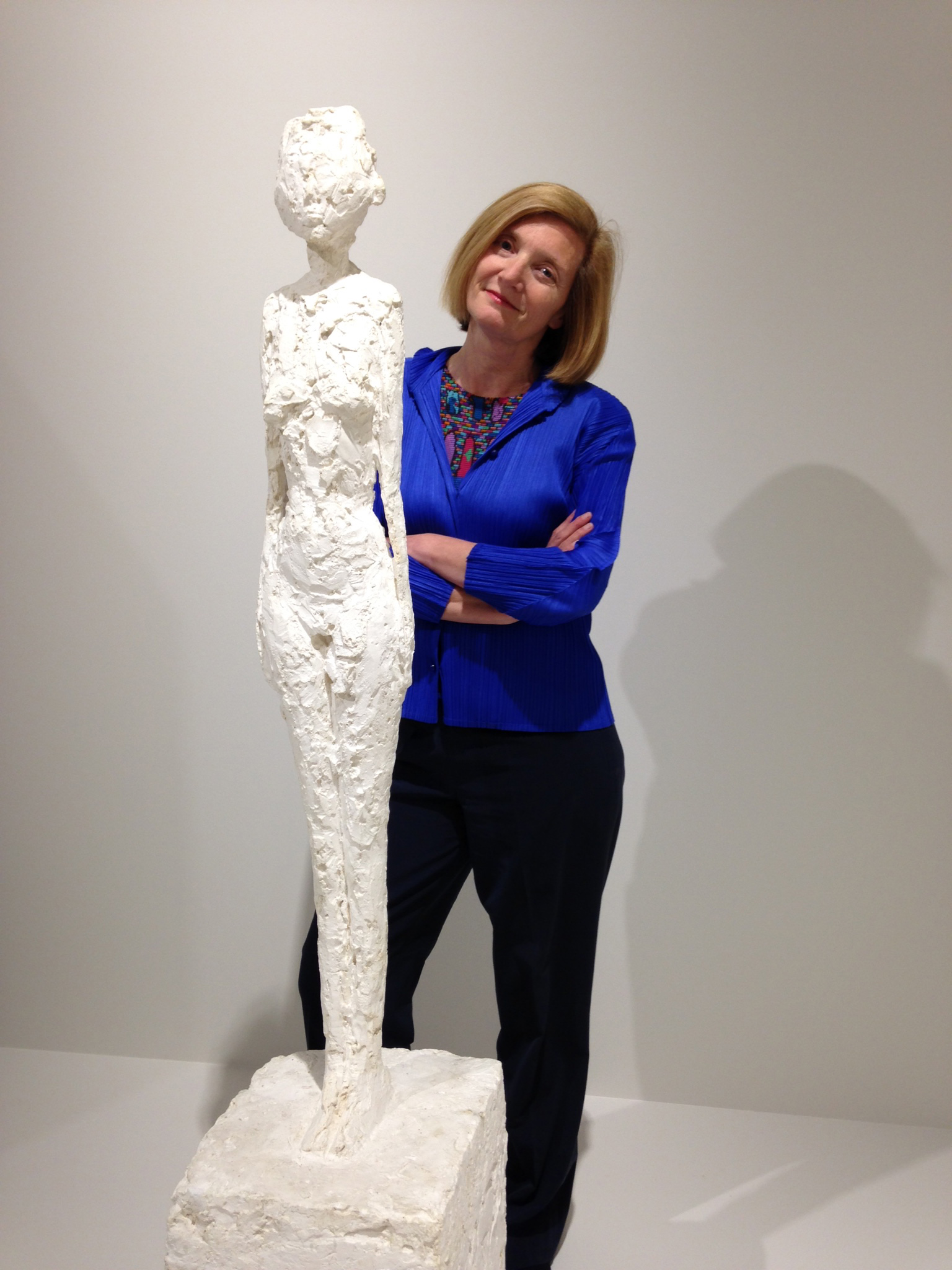 Portrait de Catherine Grenier lors de l'ouverture de l'exposition Alberto Giacometti à Landerneau (juin 2015)